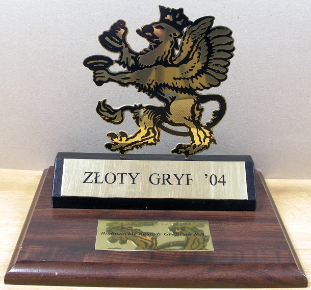 statuetka "Złoty Gryf"